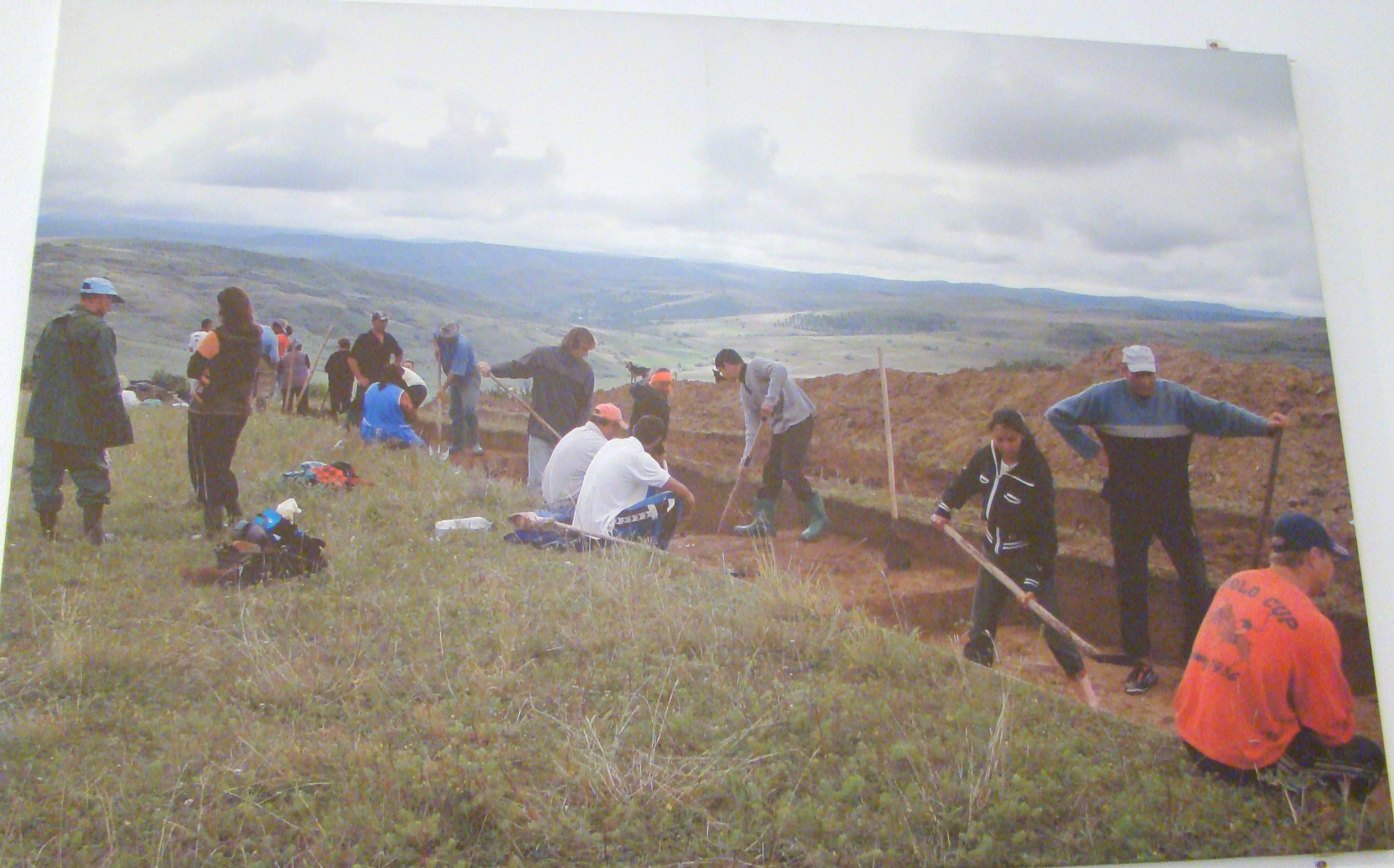 Muzeul grăniceresc năsăudean